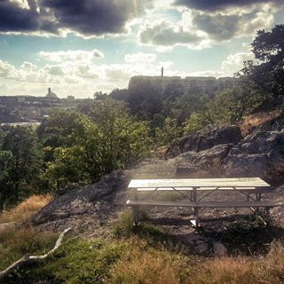 Grillplats i skogen Trolldalen på Henriksdalsberget i Nacka.